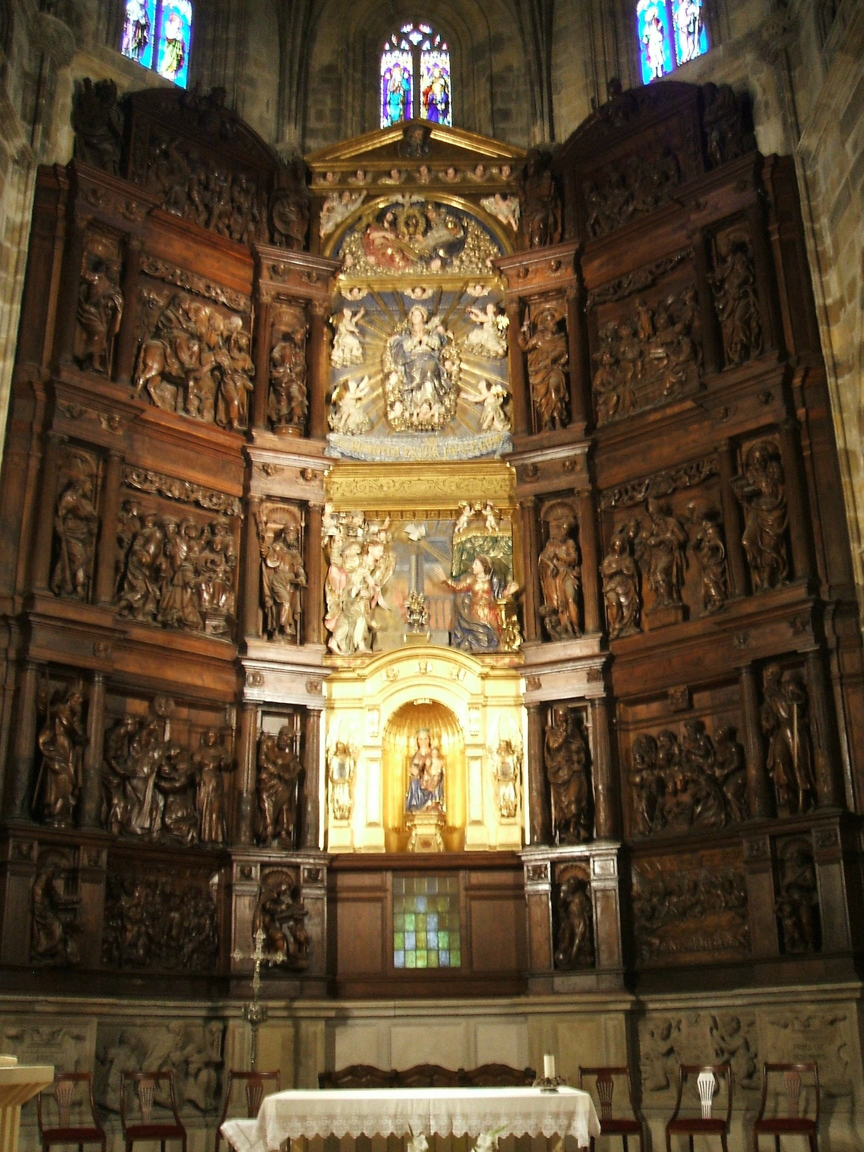 Retablo Mayor renacentista (mediados del s-XVI), obra de Juan de Beaugrant, Juan de Ayala y Juan Imberto, en la Basílica de Santa María, Portugalete, Vizcaya, País Vasco, España